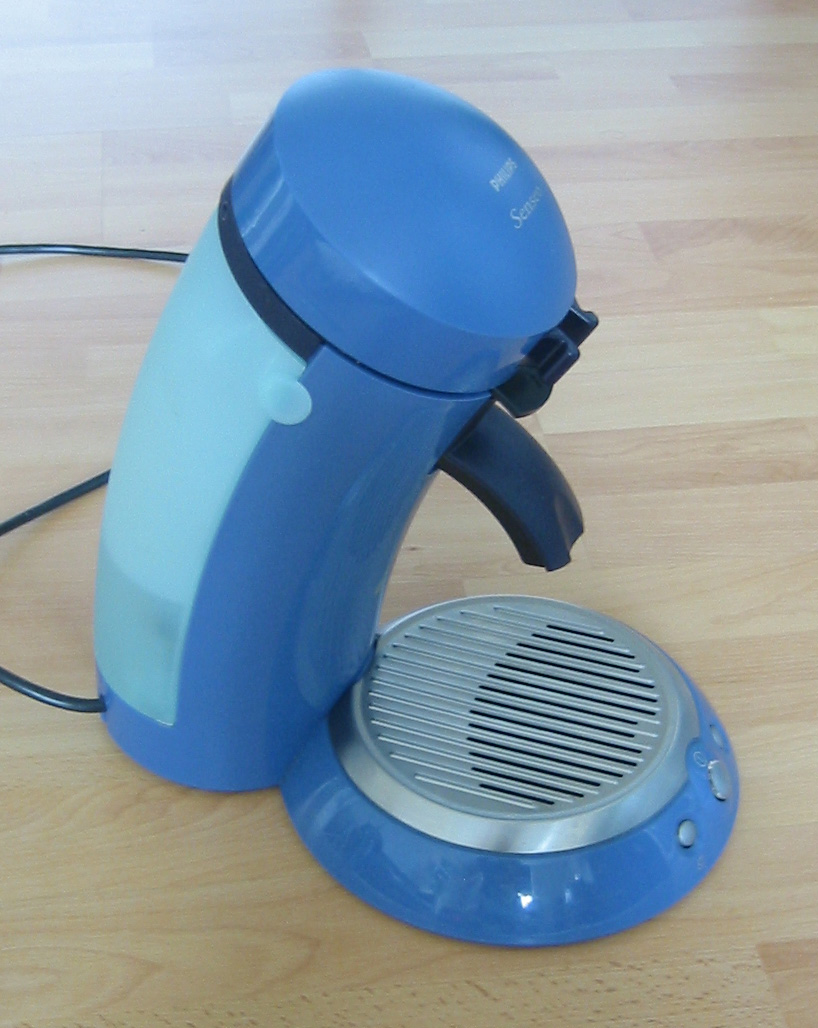 Senseo-Kaffeeautomat der ersten Generation